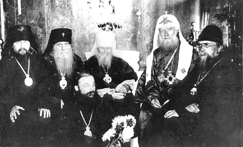 Патриарх Тихон в гостях у бывшего митрополита Московского и Коломенского Макария (Невского) в Николо-Угрешском монастыре. Рядом с ними (слева направо) священномученики: епископ Серпуховский Арсений (Жадановский), архиепископ Бийский Иннокентий (Соколов), с цветами - епископ Волоколамский Феодор (Поздеевский) и крайний справа - епископ Звенигородский Николай (Добронравов).